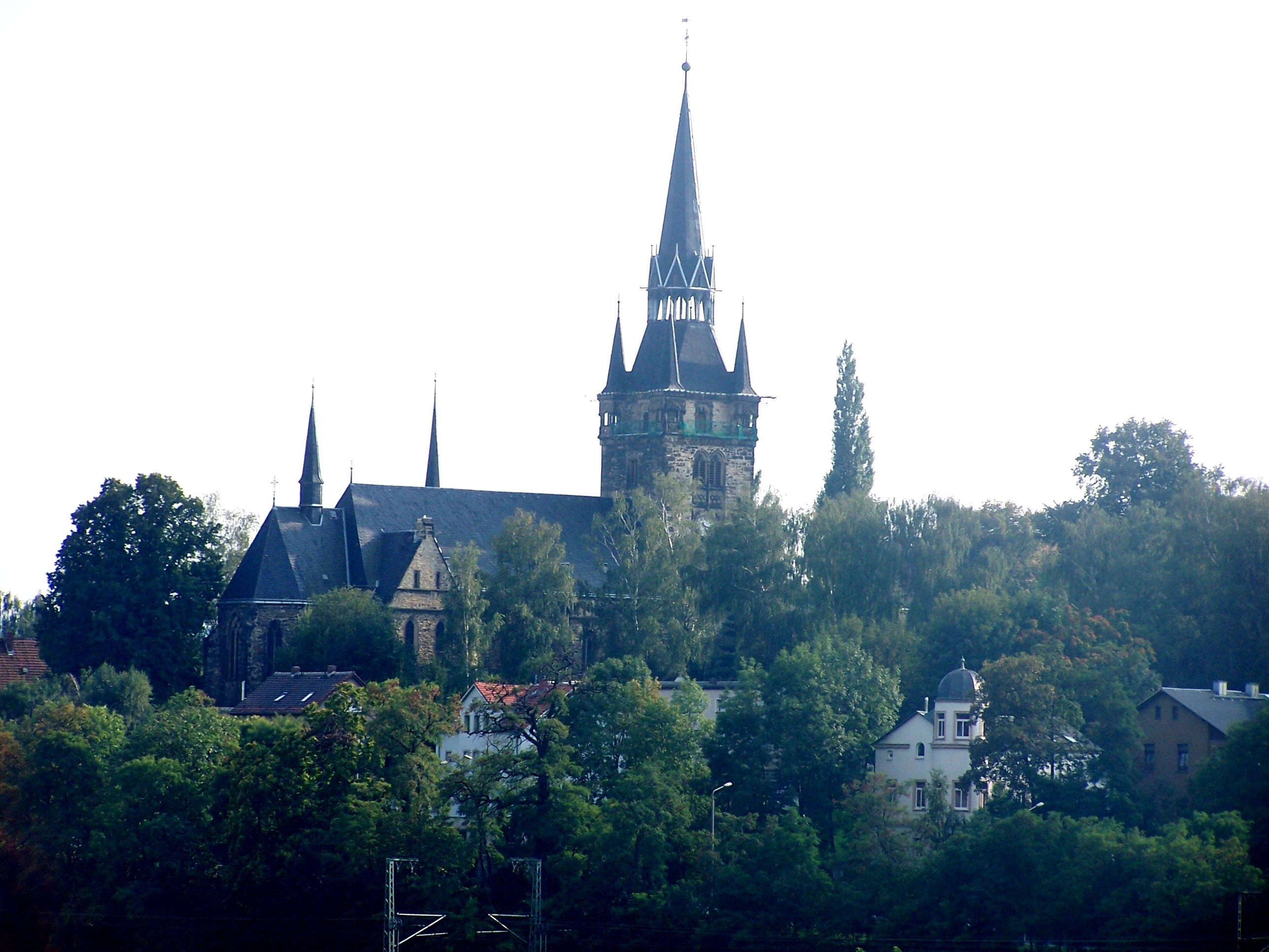 Kirche in Briesnitz (Dresden)